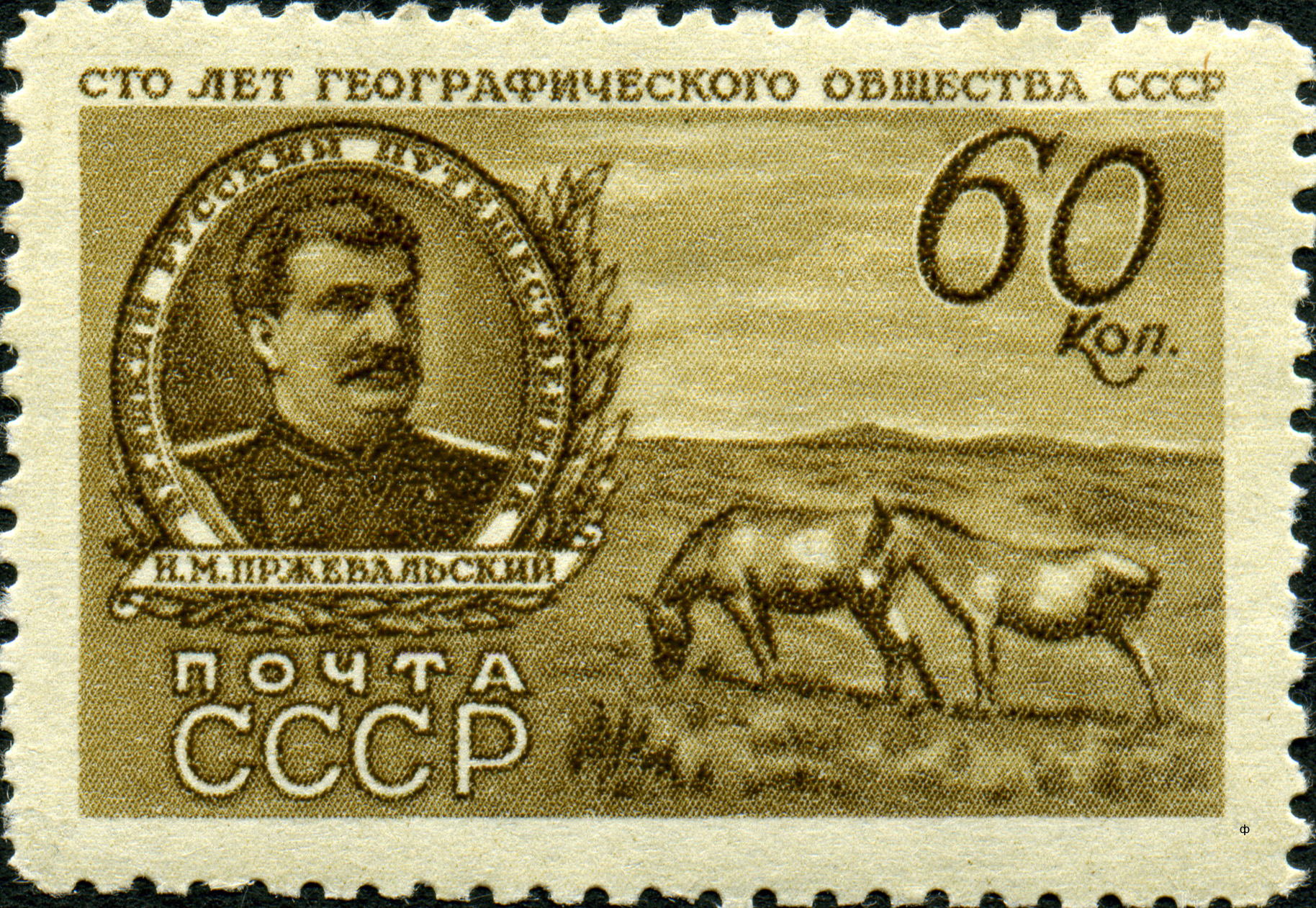 Марка СССР